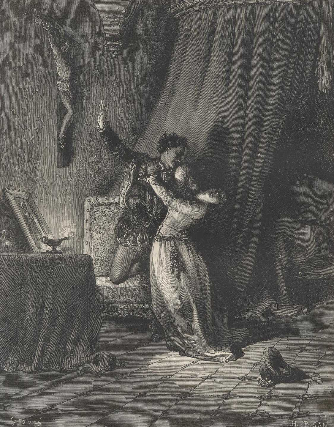 Ilustração de Gustave Doré para a edição de 1863 de "Dom Quixote" de Miguel de Cervantes